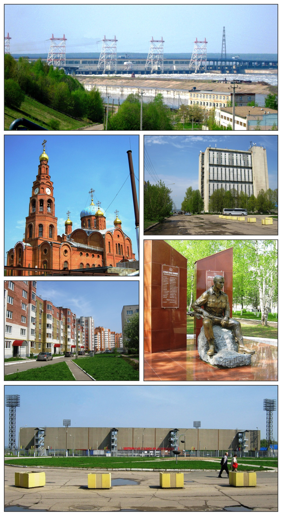 Коллаж из фотографий собственной съёмки. Новочебоксарск.